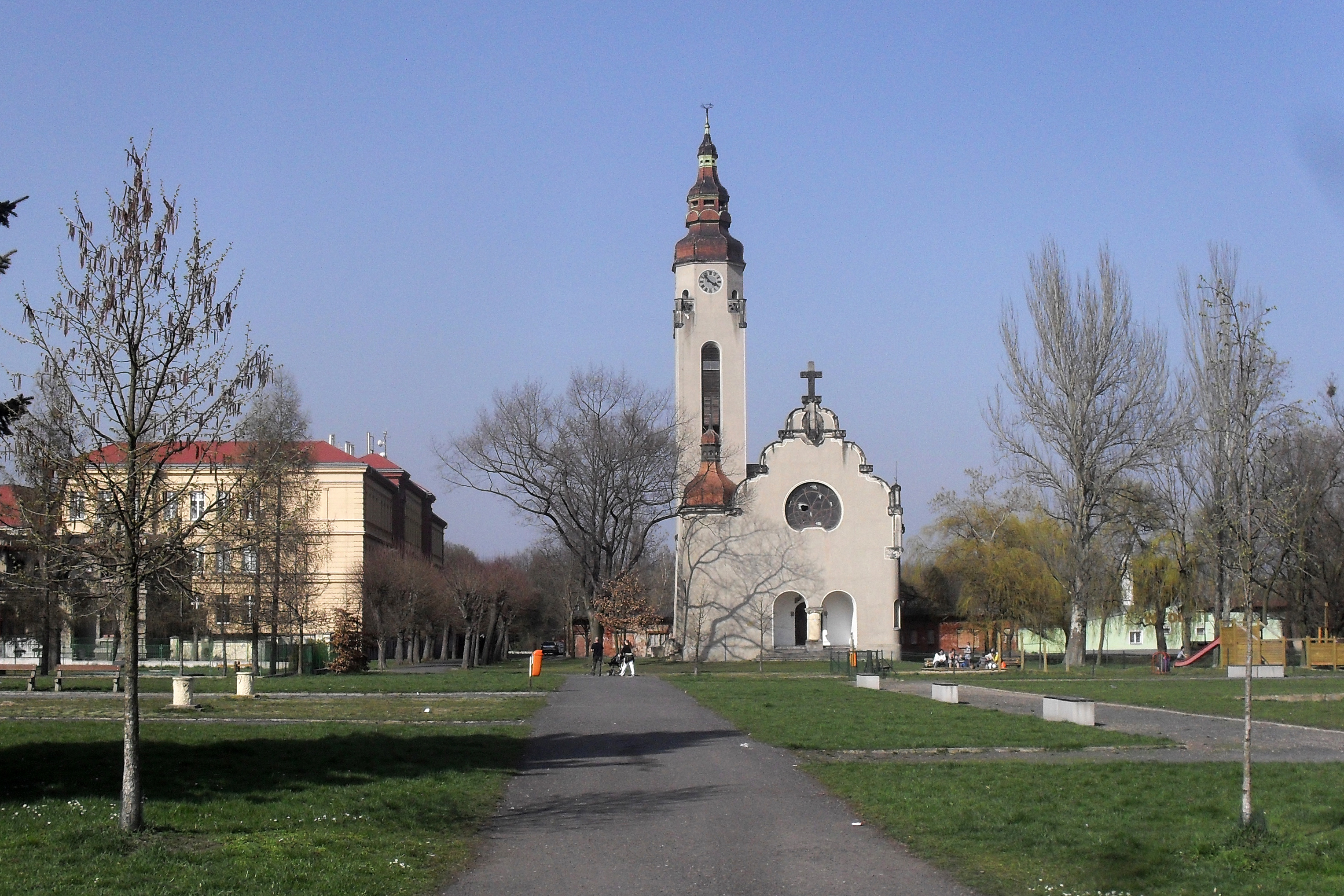 Duchcovský Kostel Církve československé husitské.